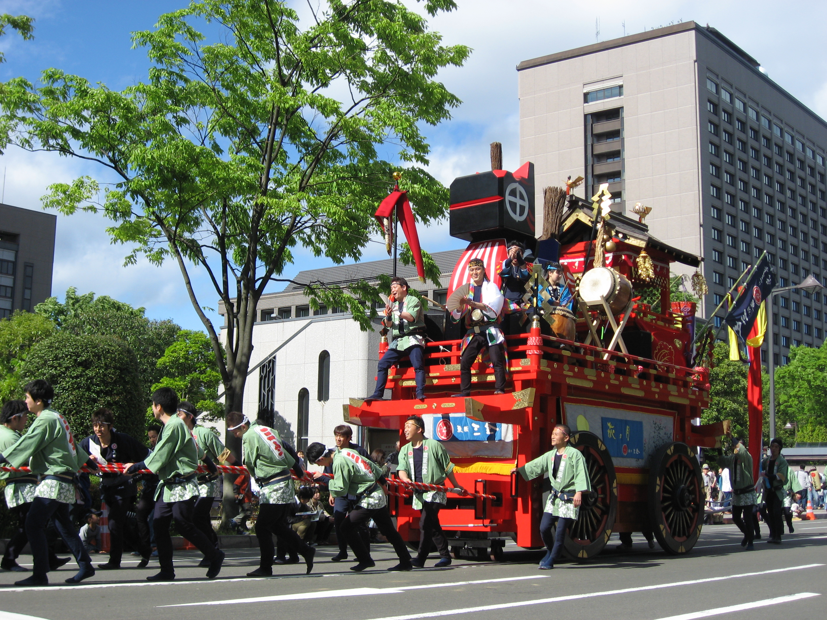 仙台青葉まつり青葉駒山鉾。仙台市役所前にて。